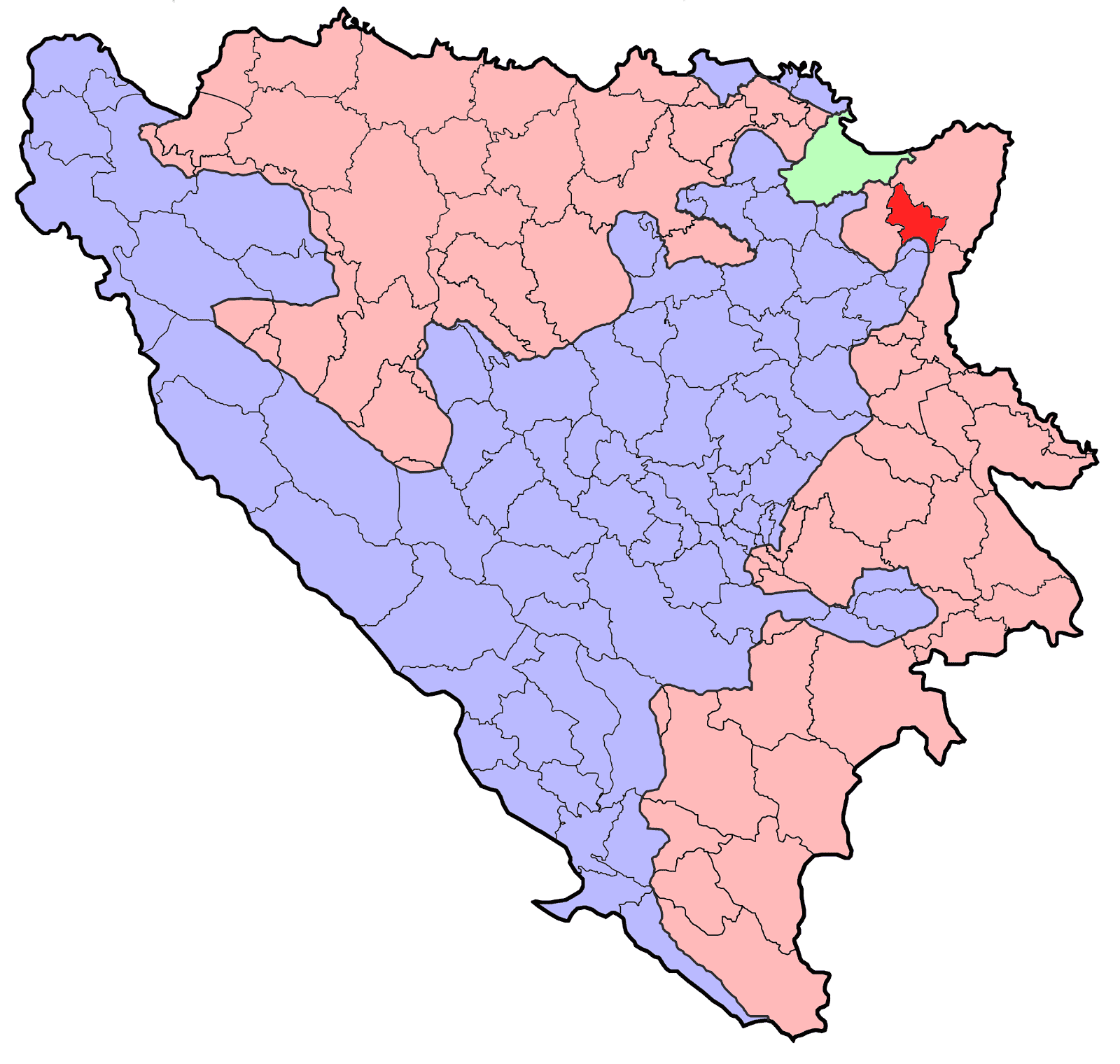 Republika Srpska (BiH) municipality